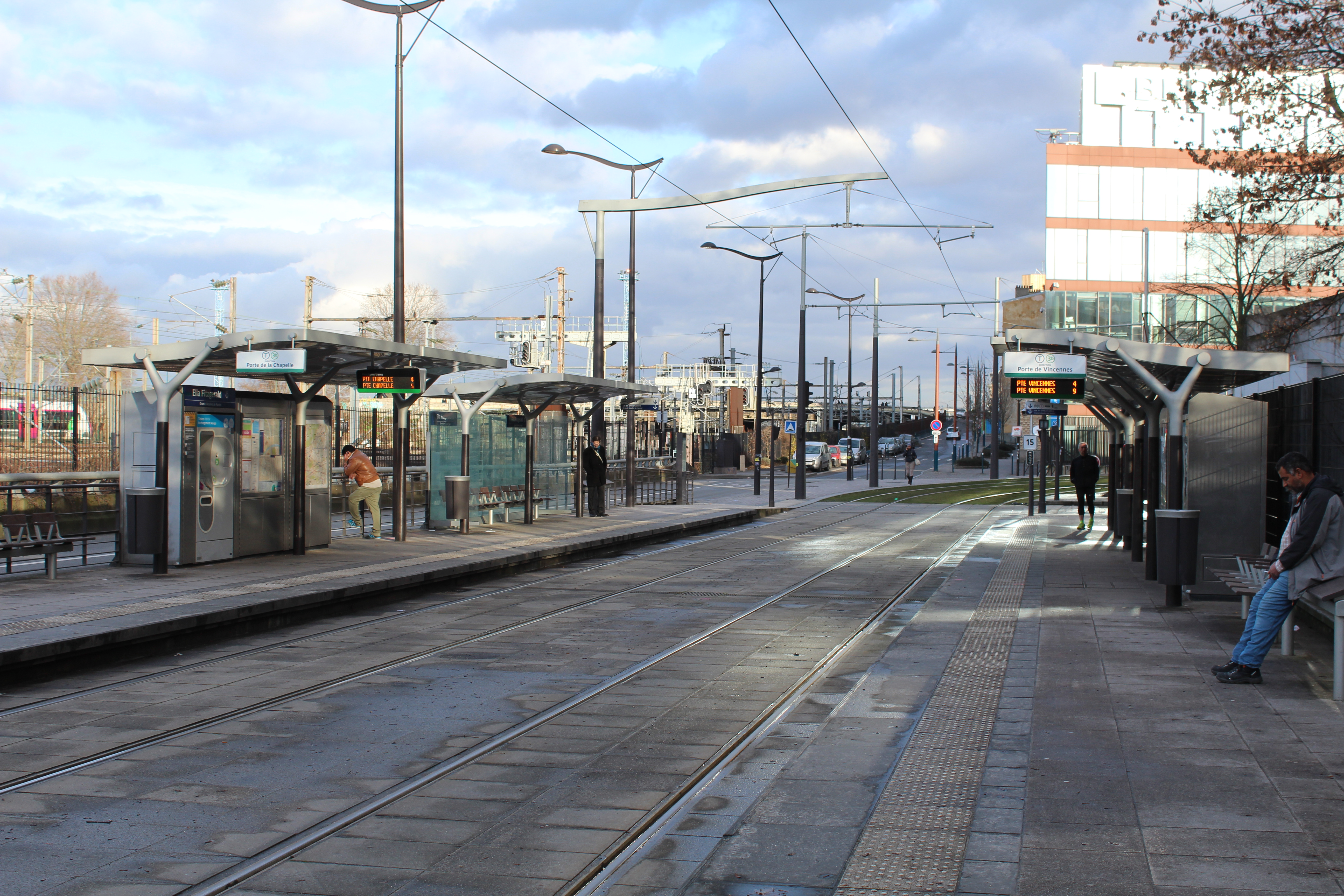 Station de tramway Ella Fitzgerald - Grands Moulins de Pantin sur la ligne 3b du tramway d'Île-de-France.